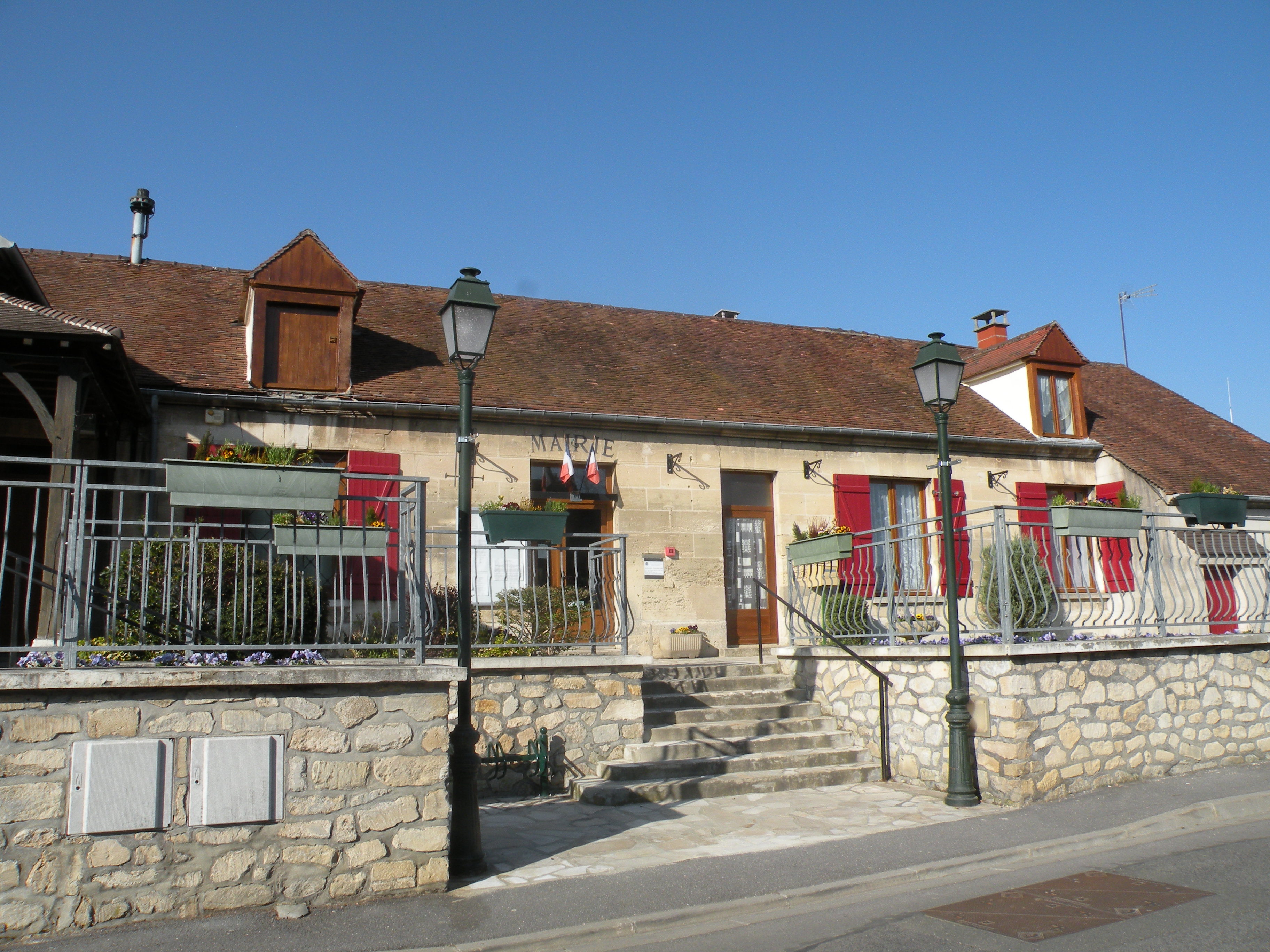 mairie de Le Mesnil-en-Thelle